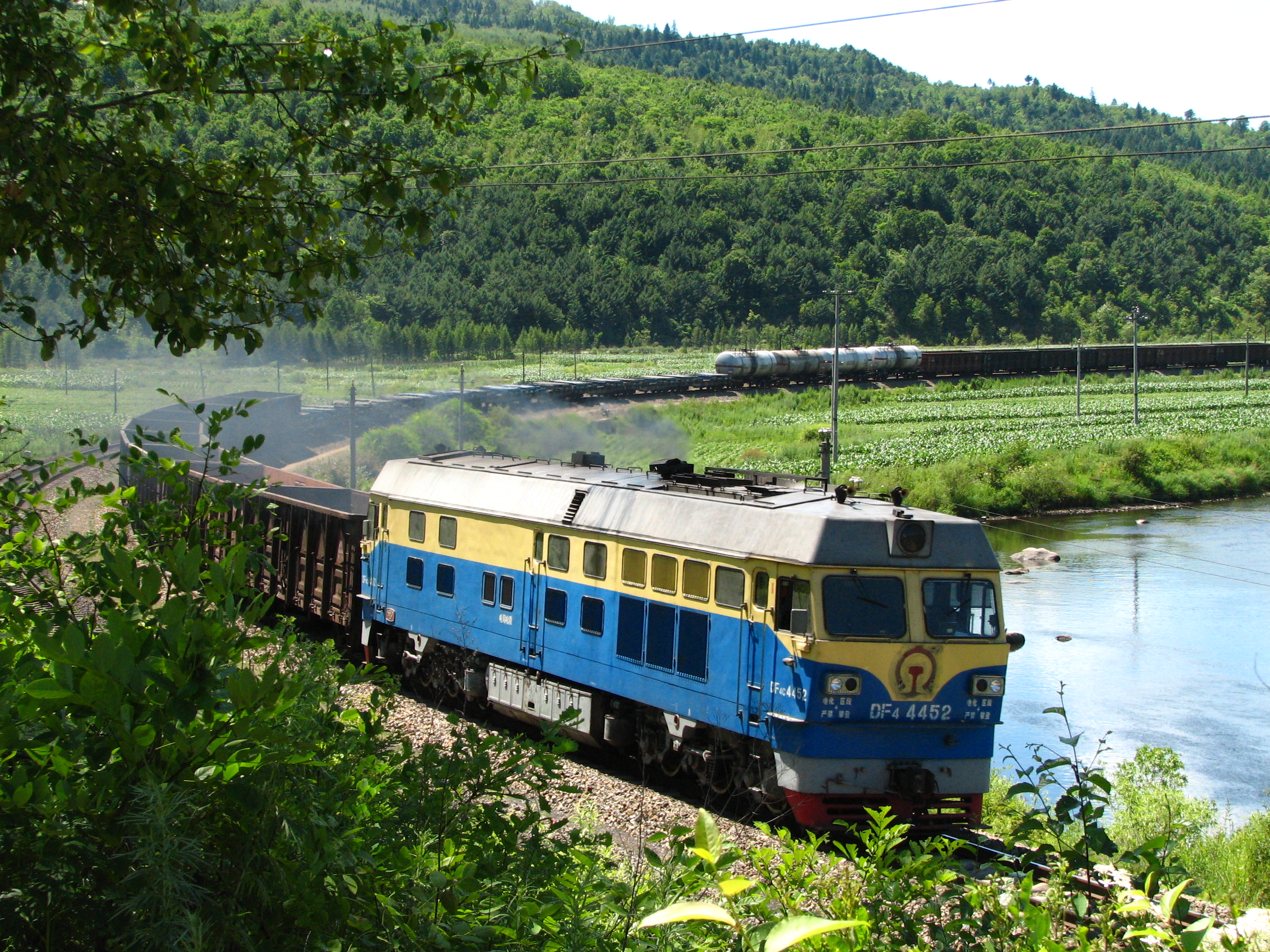 Nancha, Yichun, Heilongjiang, China